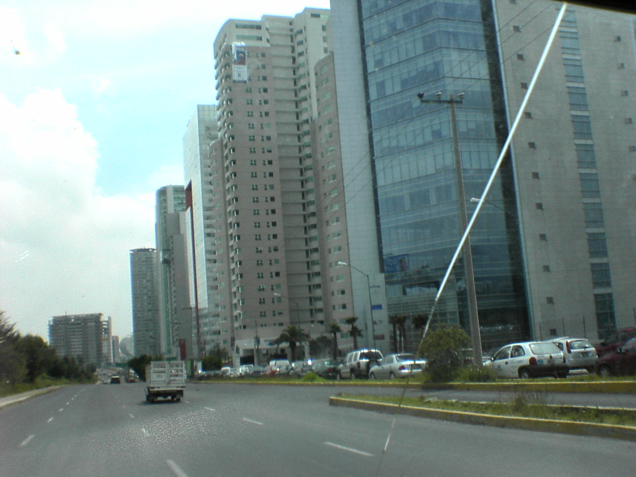 Los rascacielos de Santa Fe